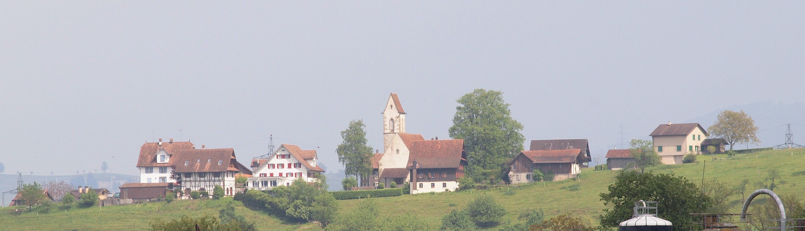 Die Siedlung St. Wolfgang der Gemeinde Hünnenberg von der Reussebene aus gesehen.